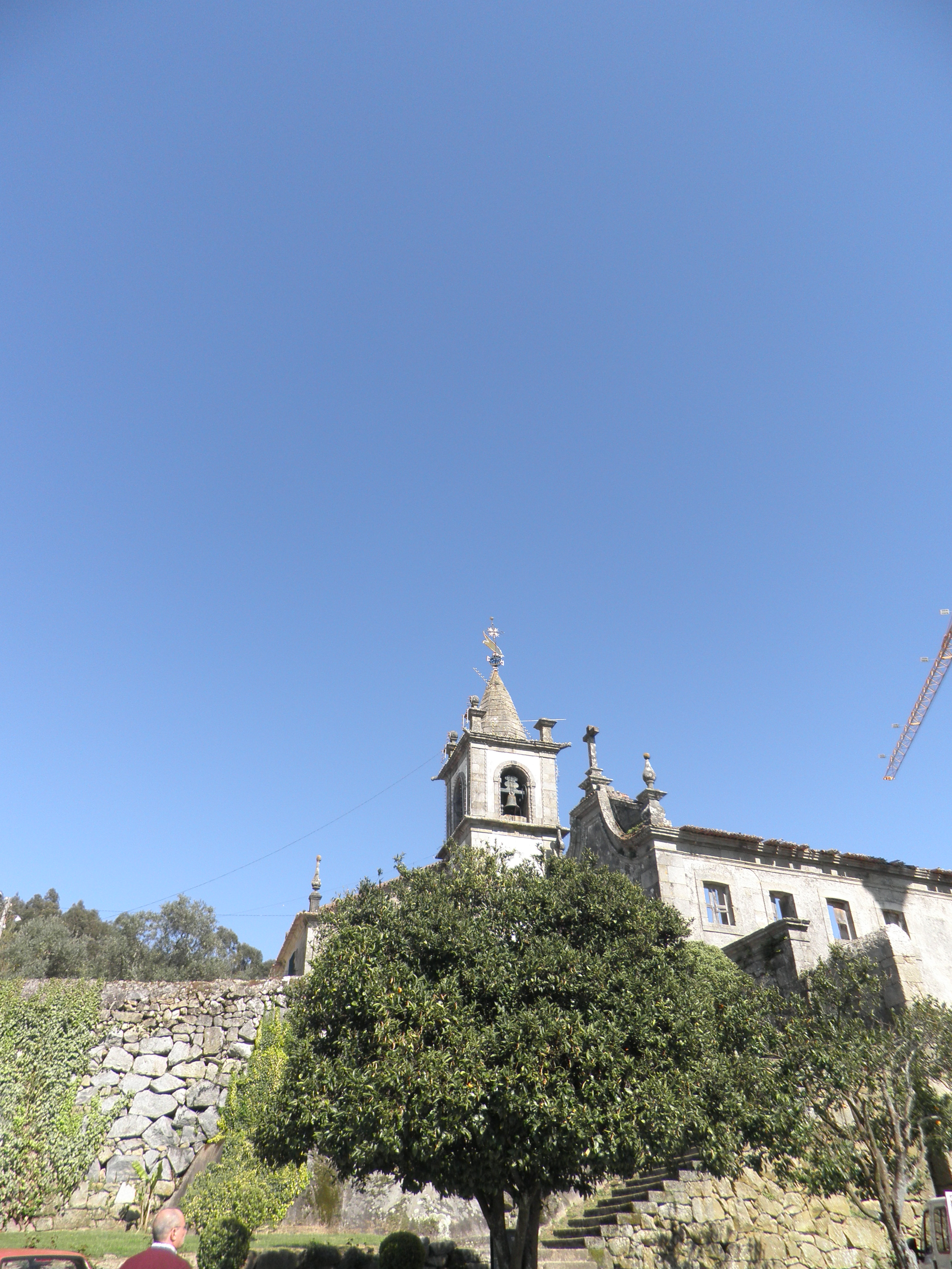 em Baião, actualmente em recuperação.